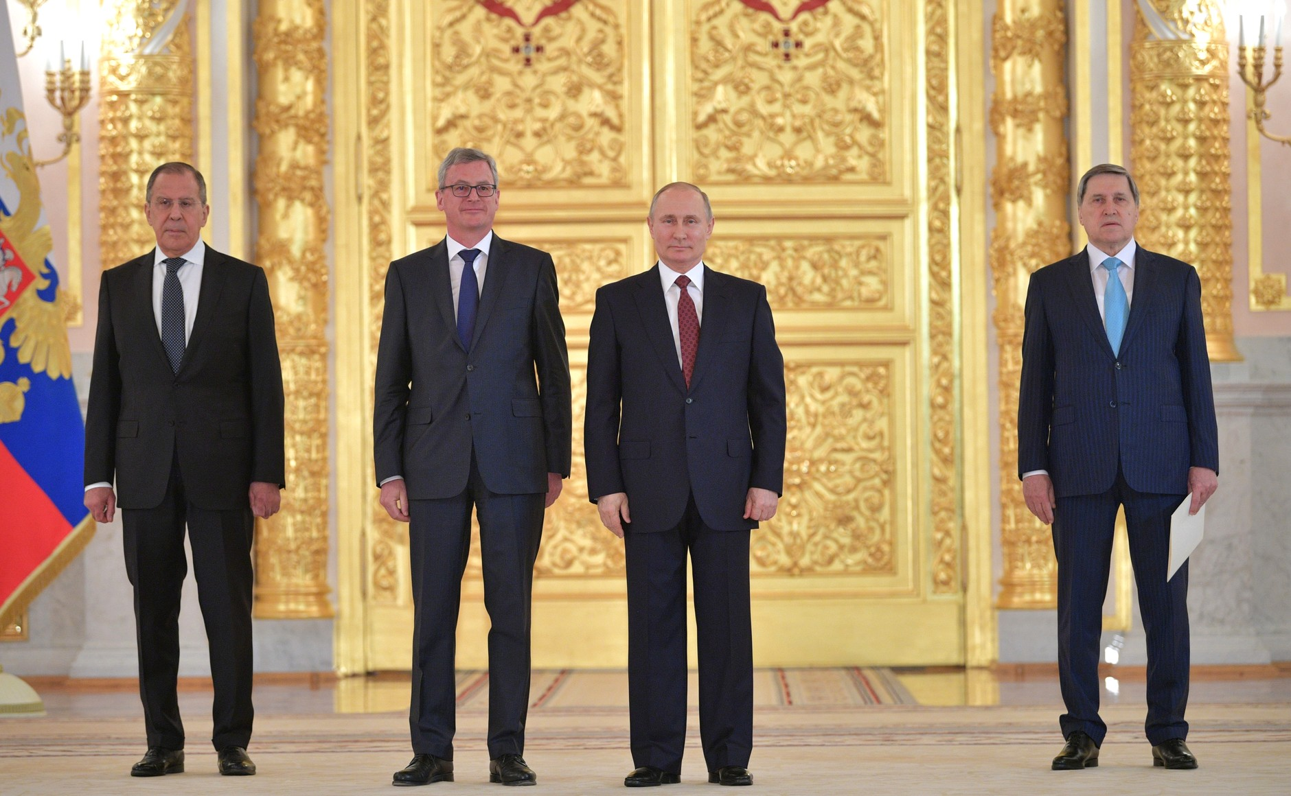 В Александровском зале Большого Кремлёвского дворца Владимир Путин принял верительные грамоты у послов ряда иностранных государств. На церемонии вручения верительных грамот. С Чрезвычайным и Полномочным Послом Австрийской Республики в Российской Федерации Йоханнесом Айгнером.